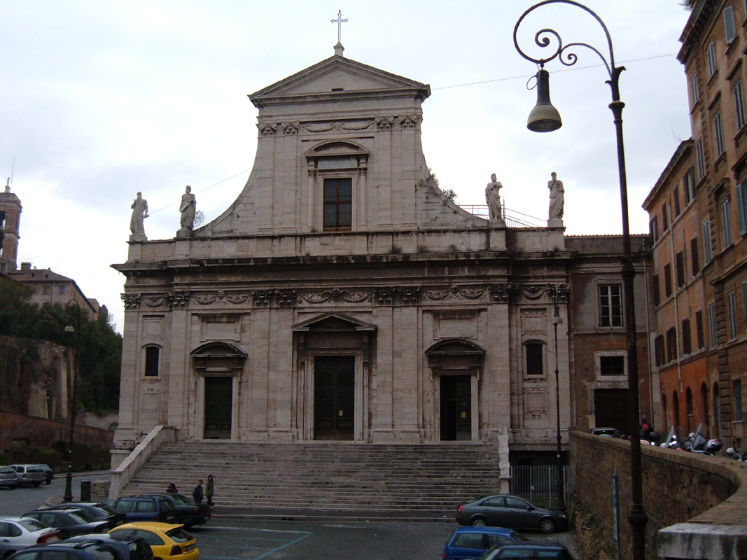 Chiesa di Santa Maria della Consolazione, a Roma, nel rione Campitelli. Foto personale.